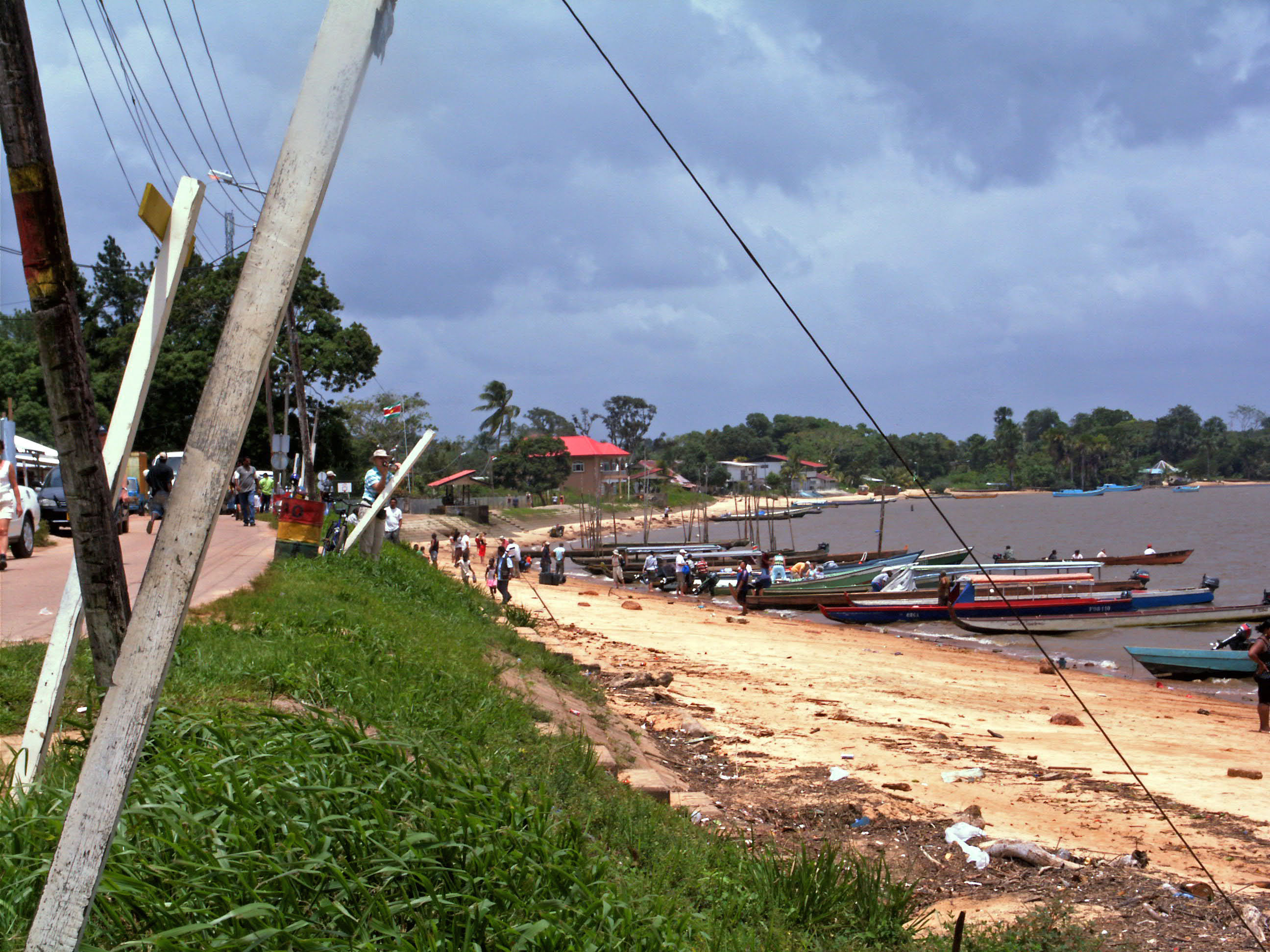 Albina, Suriname am Marowijne-Fluss im März 2008